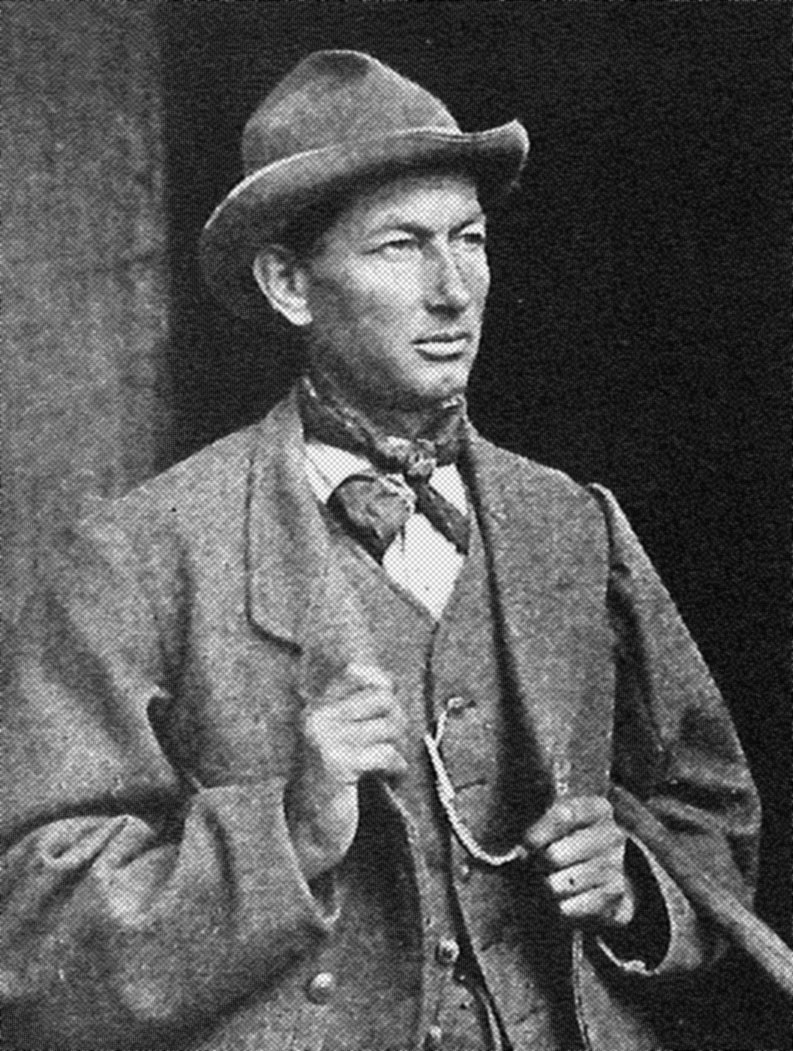 Emile Rey (1846 - 1895)